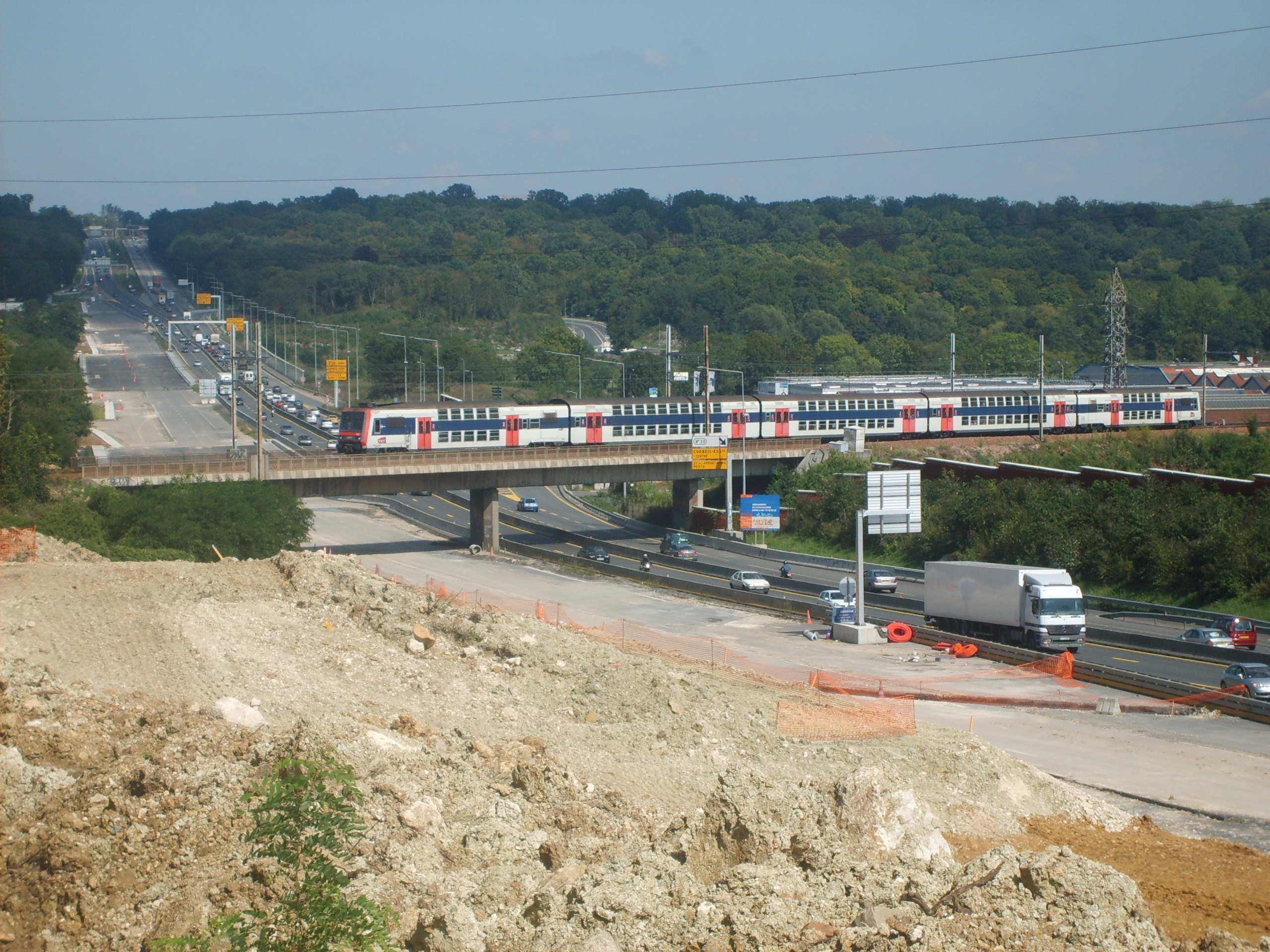 Pont de GCE sur la RN104